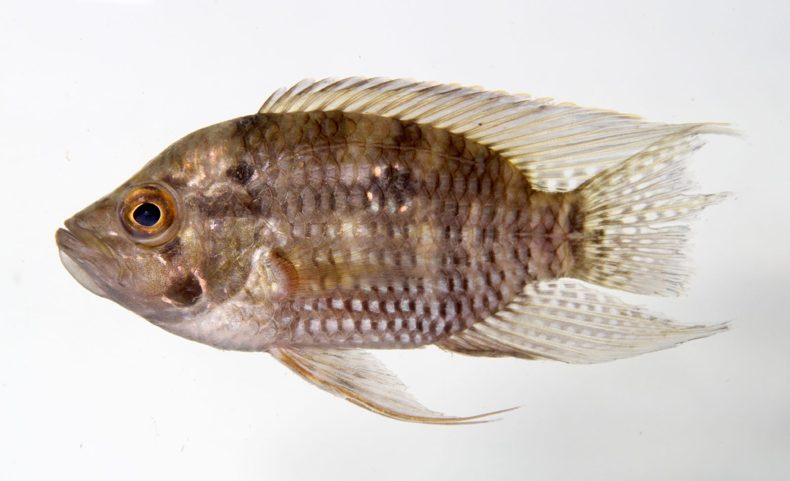 Acaronia vulpinus